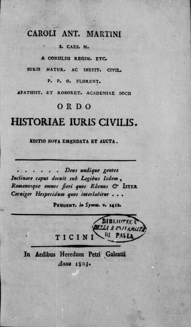 Frontespizio